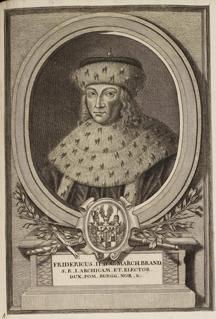 Grafik aus dem Klebeband Nr. 1 der Fürstlich Waldeckschen Hofbibliothek Arolsen Motiv: Kurfürst Friedrich II. von BrandenburgLateinische Bildunterschrift: FRIDERICUS.II.D.G.MARCH.BRAND.S.R.I.ARCHICAM.ET.ELECTOR.DUX.POM.BURGG.:NOR.&c. Deutsche Übersetzung: Friedrich II., von Gottes Gnaden Markgraf von Brandenburg, des Heiligen Römischen Reiches Erzkämmerer und Kurfürst, Herzog von Pommern, Burggraf von Nürnberg etc.